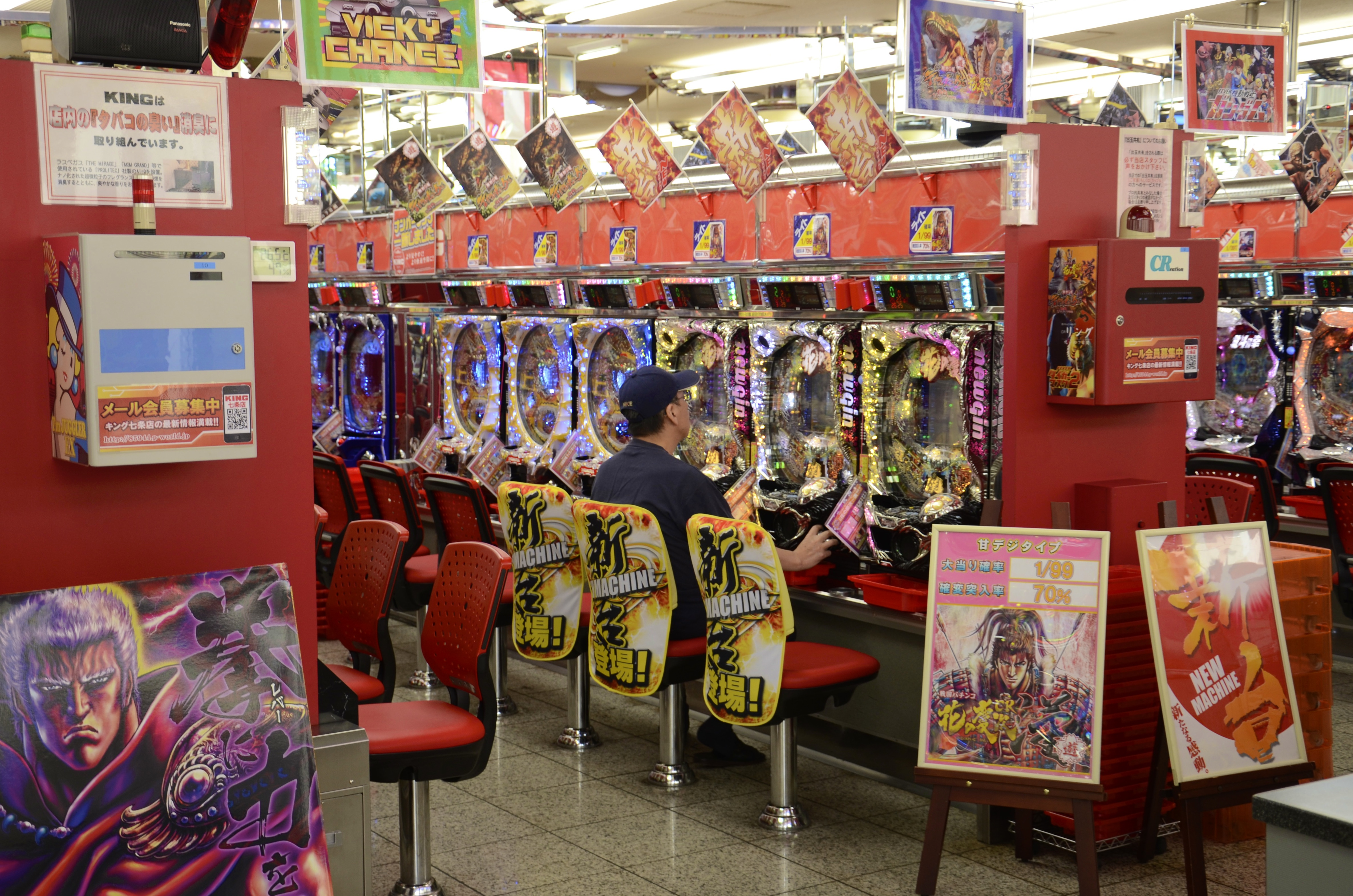 Pachinko!